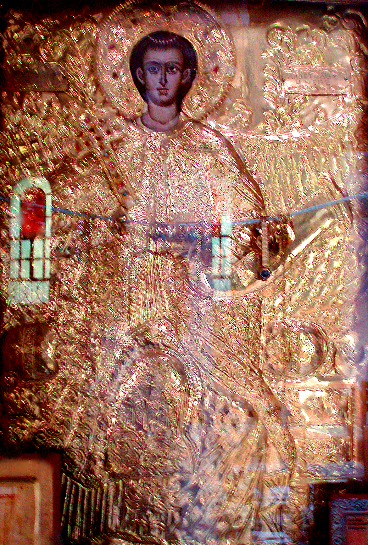 Άγιος Απόστολος ο Νέος, εικόνα του αγίου απο τον Ναό του Αγίου Αποστόλου του Νέου στον Βόλο.